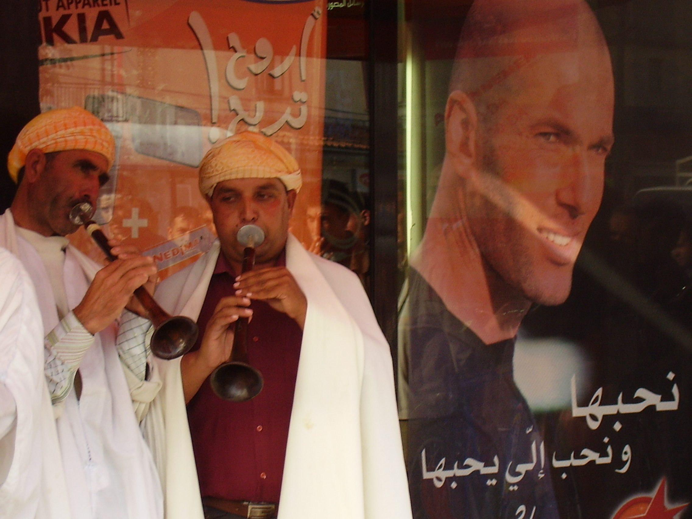 Two idebbalen playing in a street of Béjaïa (Algeria)